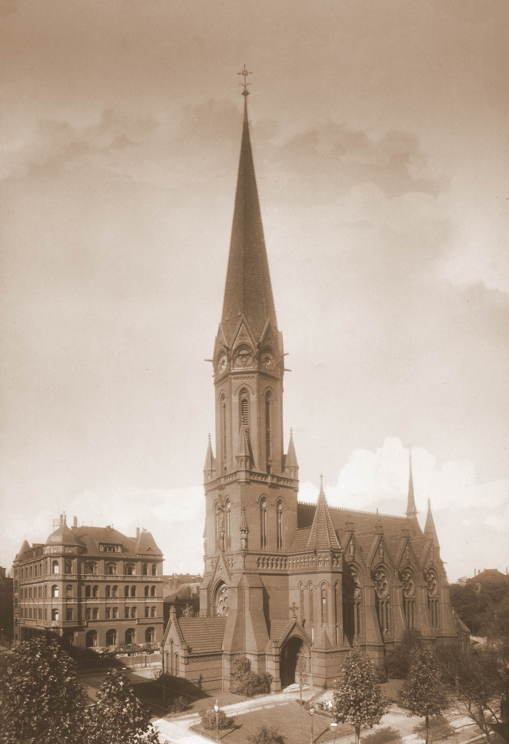 evangelische Heilandskirche in Leipzig-Plagwitz